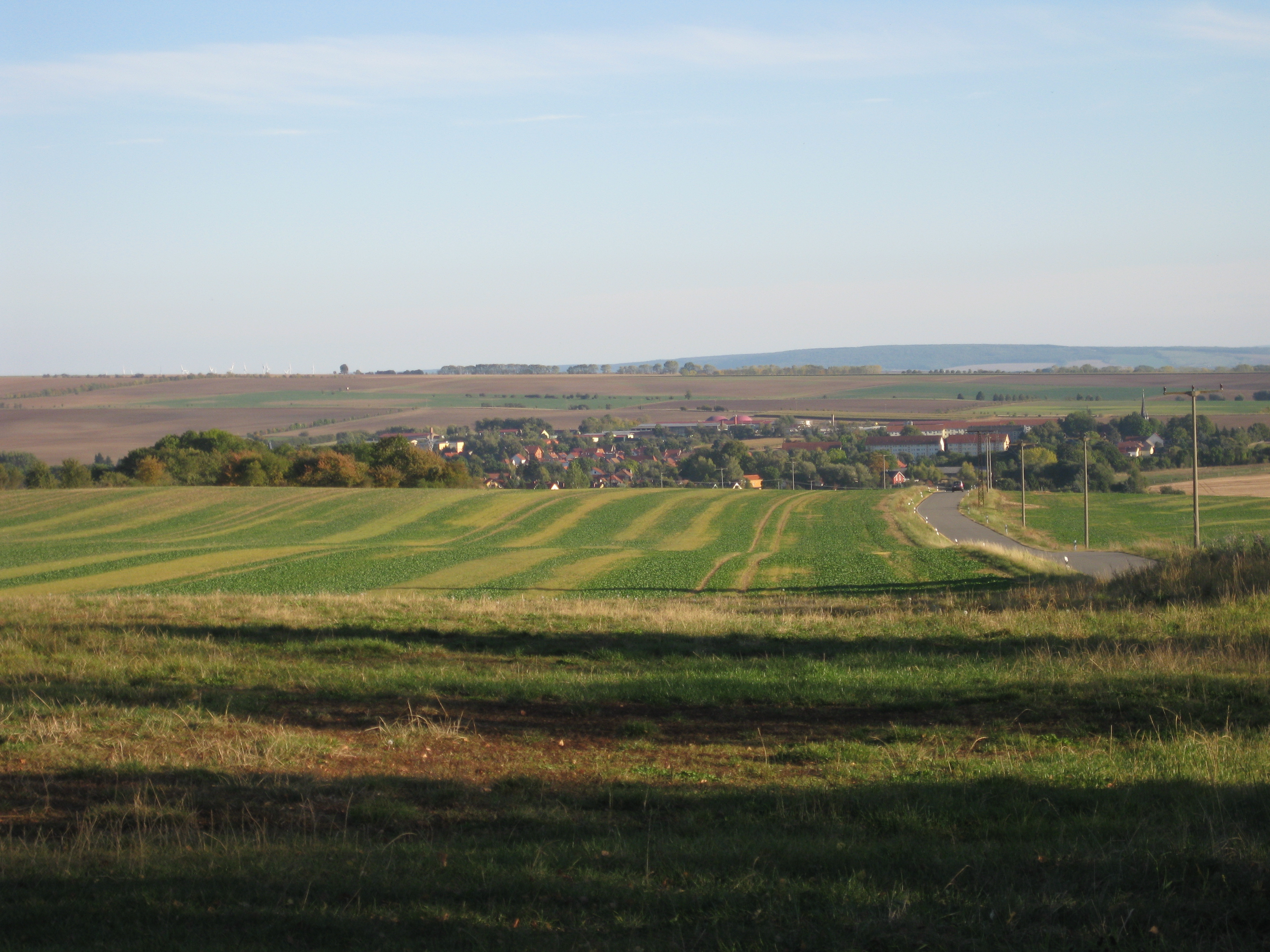 Körner (Thüringen) im Nottertal (im Hintergrund sind die Fahner Höhen erkennbar)